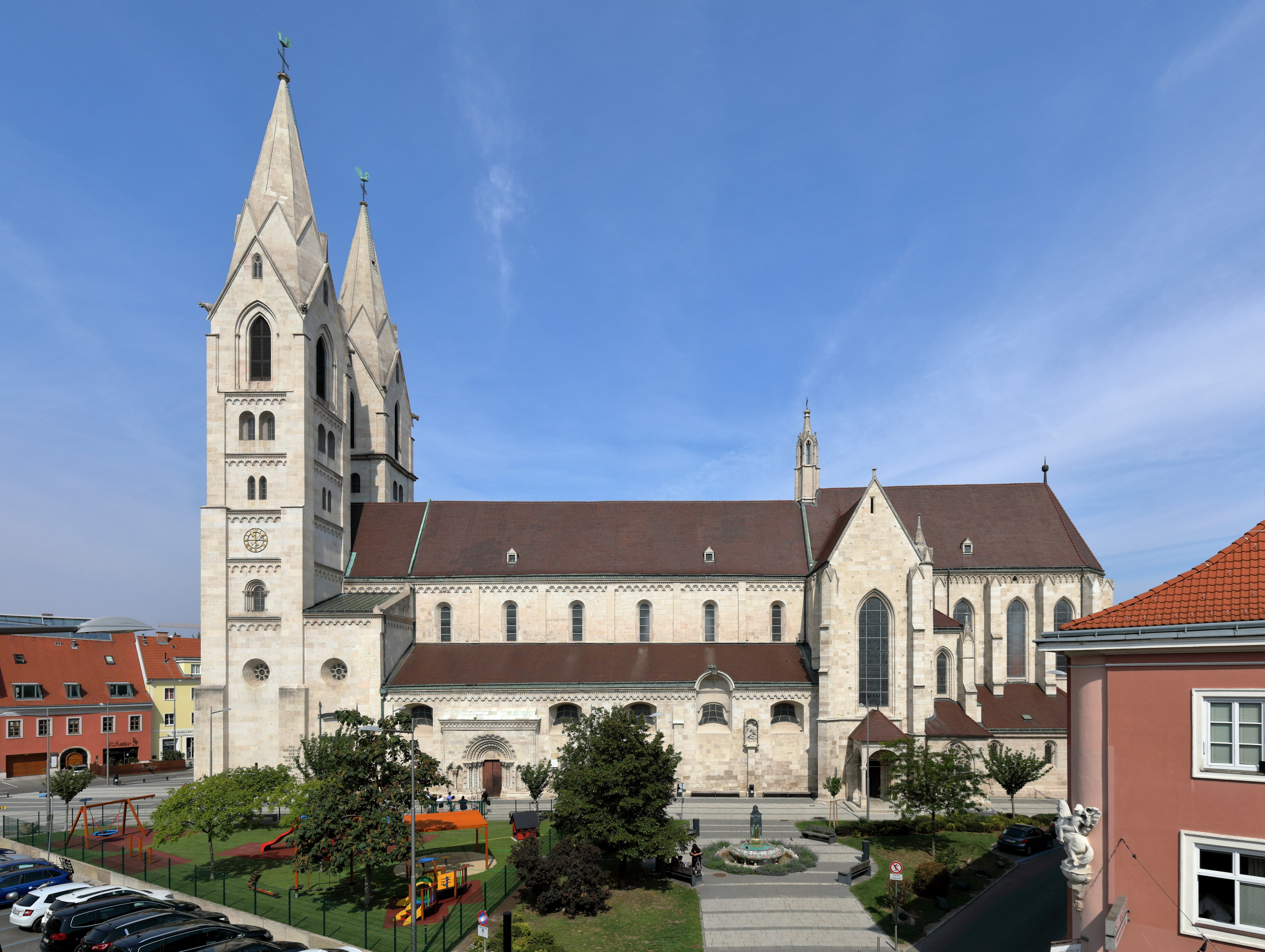 Südostansicht des Domes Mariä Himmelfahrt in der niederösterreichischen Bezirkshauptstadt Wiener Neustadt.Das Langhaus mit dem Westturmpaar wurde von 1193 bis 1279 im spätromanischen-frühgotischen Stil errichtet. Im ersten Viertel des 14. Jahrhunderts wurde das Querschiff und der polygonale Chor mit den Seitenchören sowie eine zweigeschossige Sakristei im Norden errichtet. Unter Kaiser Friedrich III. erfolgten im 15. Jahrhundert Umbauten und eine Neuausstattung. Unter Bischof Ferdinand Graf von Hallweil wurde 1755 der Dom barockisiert. Nach einem Brand 1834 in der Glockenstube wurden die baufälligen Türme 1886 abgetragen und nach den alten Plänen unter der Leitung des Wiener Architekten Richard Jordan von 1892 bis 1899 wieder aufgebaut.